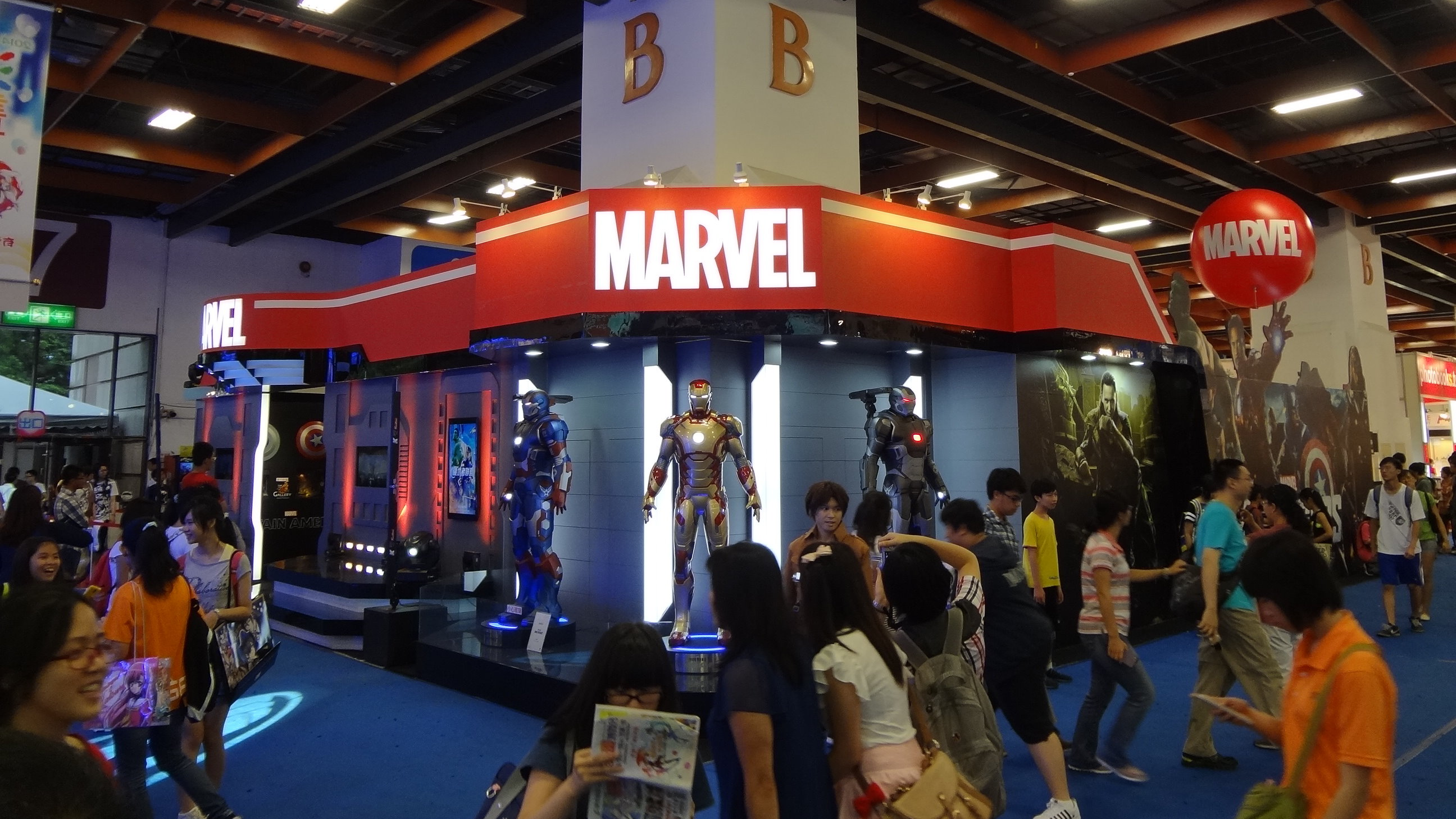 2014年（第15屆）漫畫博覽會的漫威漫畫攤位。